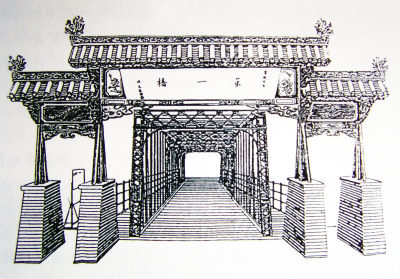 兰州黄河铁桥桥头牌厦草图